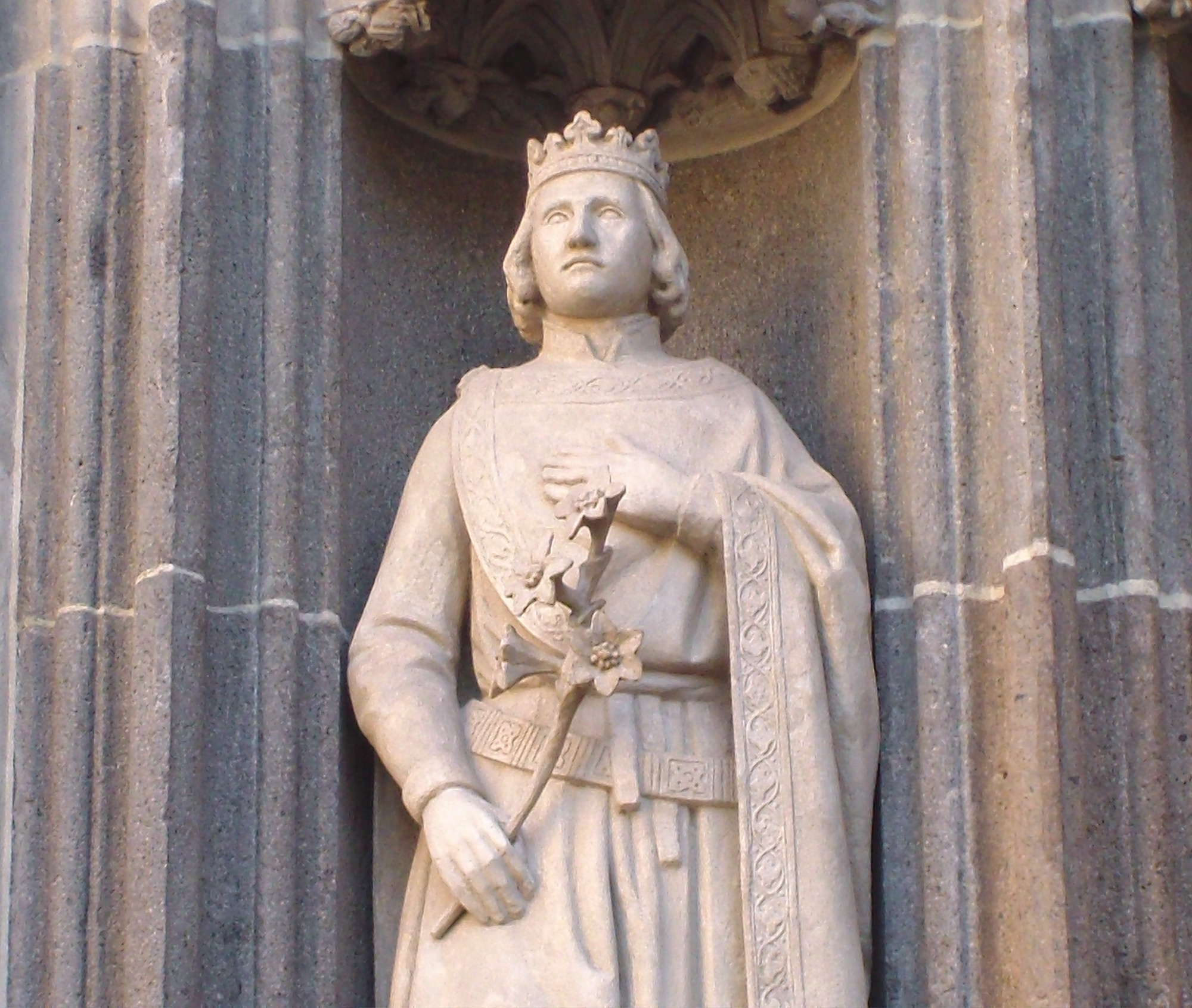 Imrich, Dóm sv. Alžbety, Košice. Photo taken by Jozafát Vladimír Timkovič, OSBM